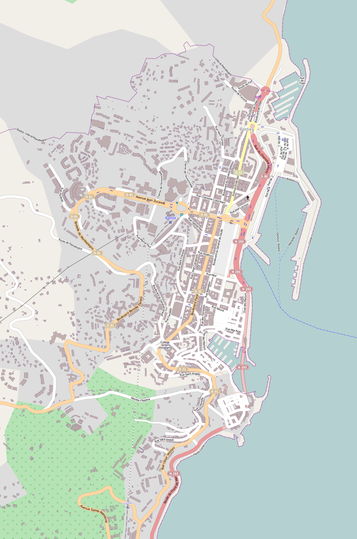 Carte routière de Bastia